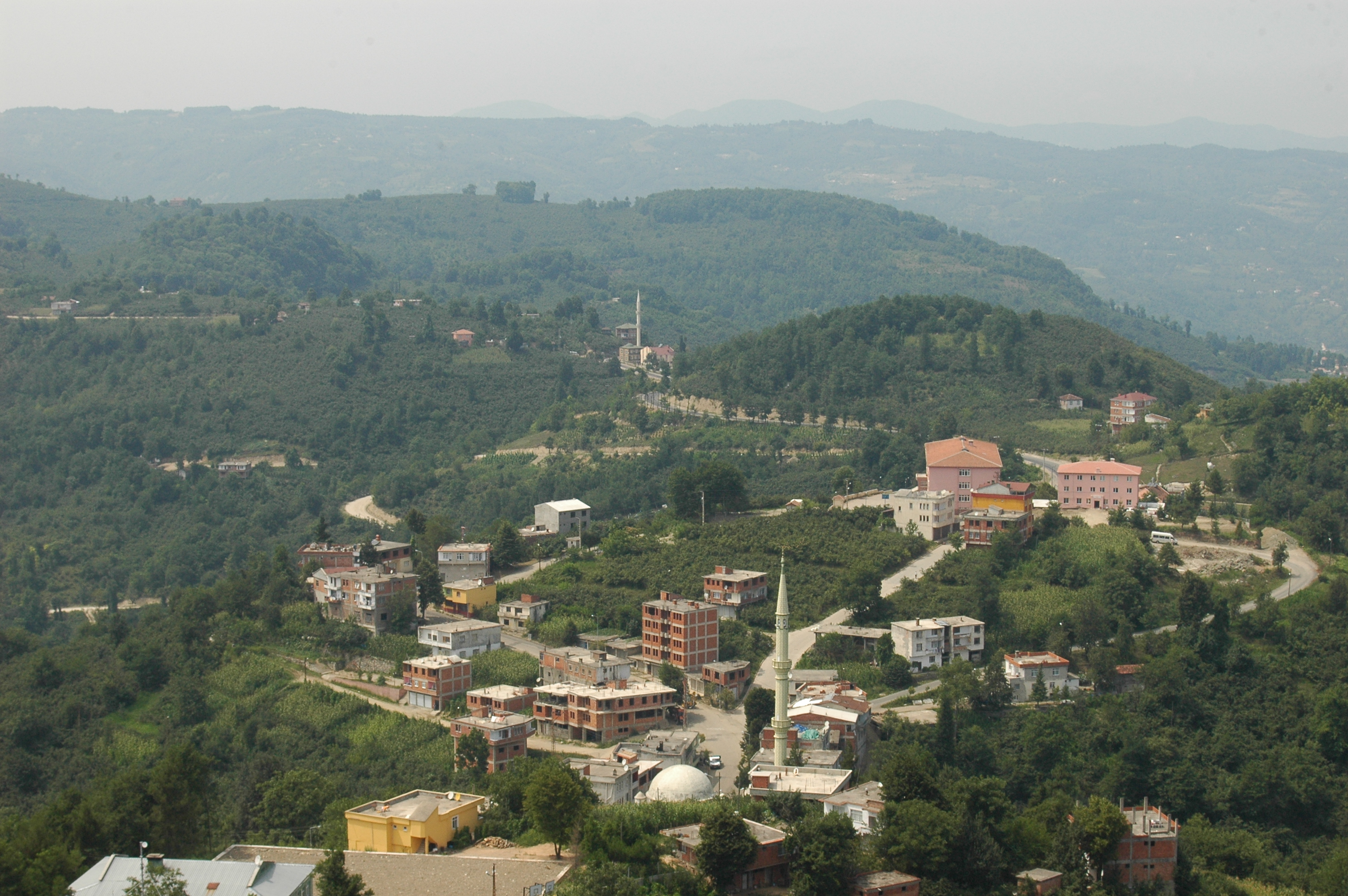 A view of Aşağı Pazar, Çamaş in Ordu province, Turkey (Gelinkaya'dan Çamaş Aşağı Pazar Görünüm)